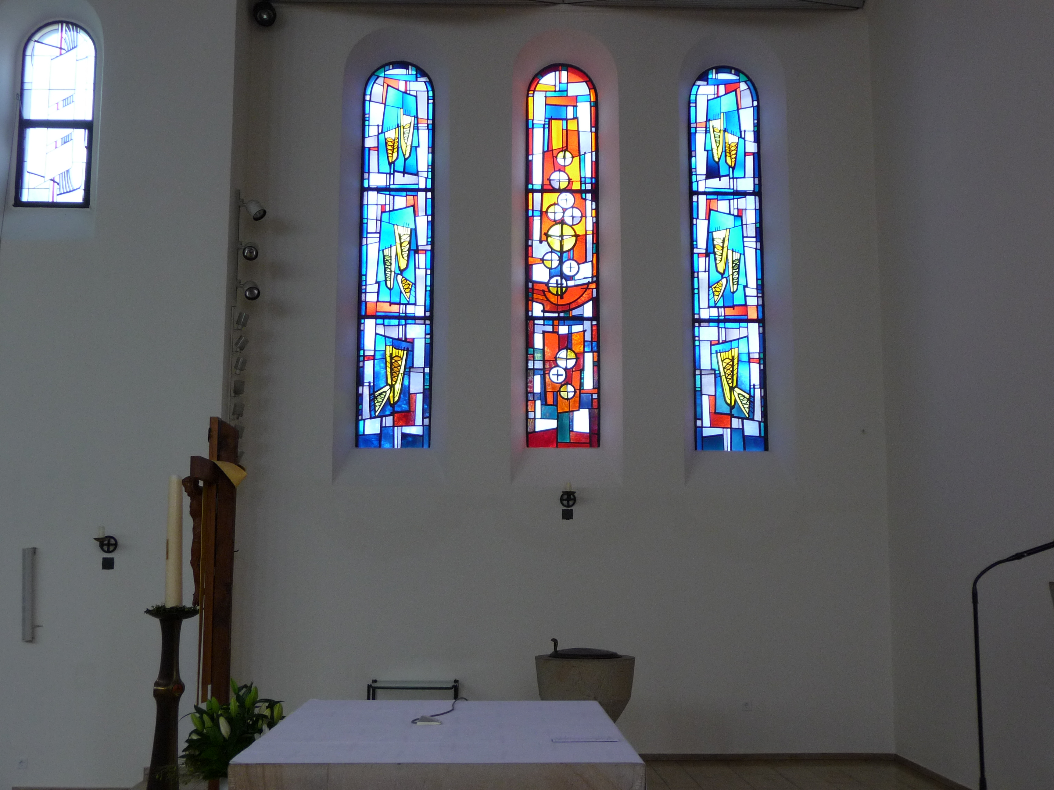 Fenster linke Seite Altarraum der St. Patrokli Kirche in Dortmund-Kirchhörde